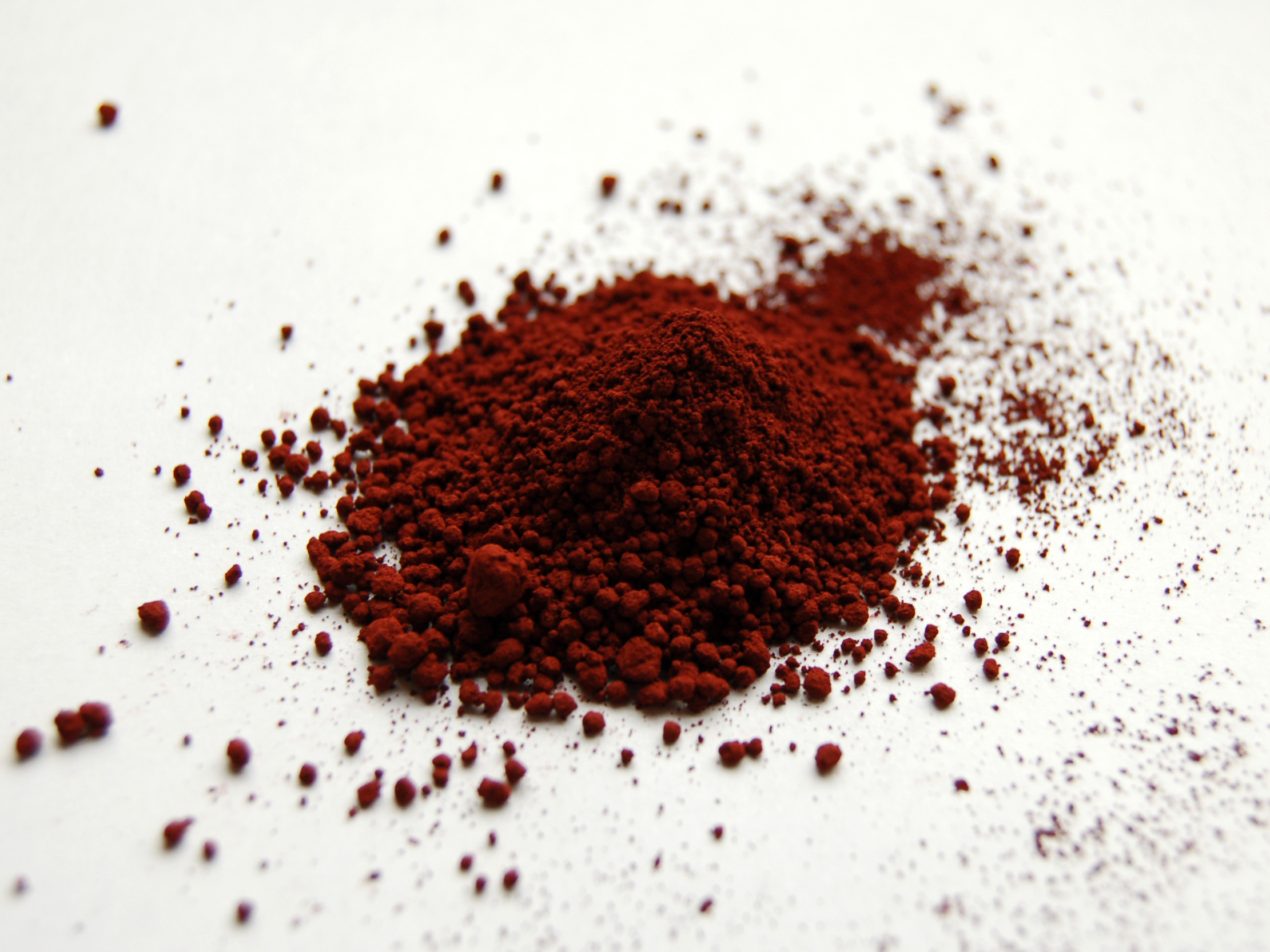 Iron(III) oxide sample